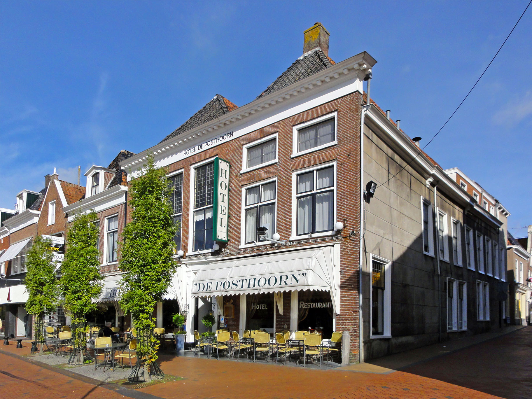 Diepswal 21, Dokkum, rijksmonument